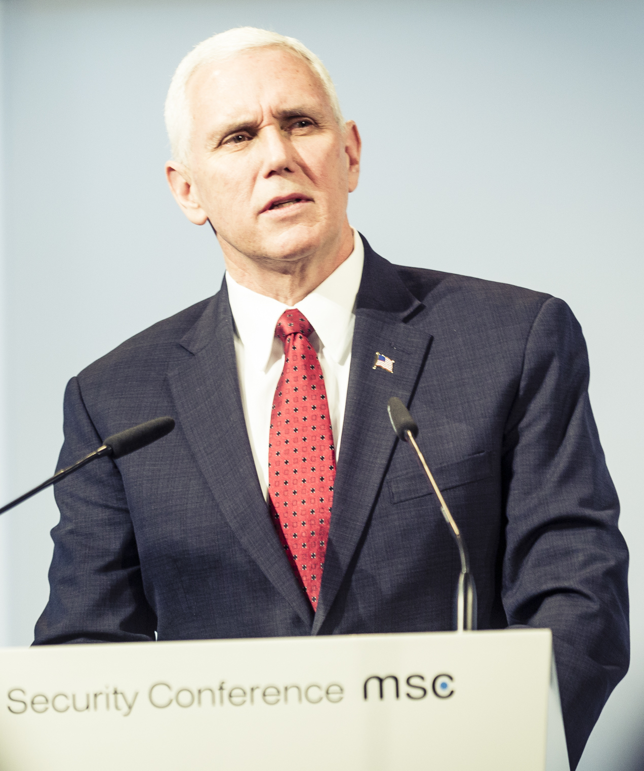 Michael Richard Pence während der Münchner Sicherheitskonferenz 2017